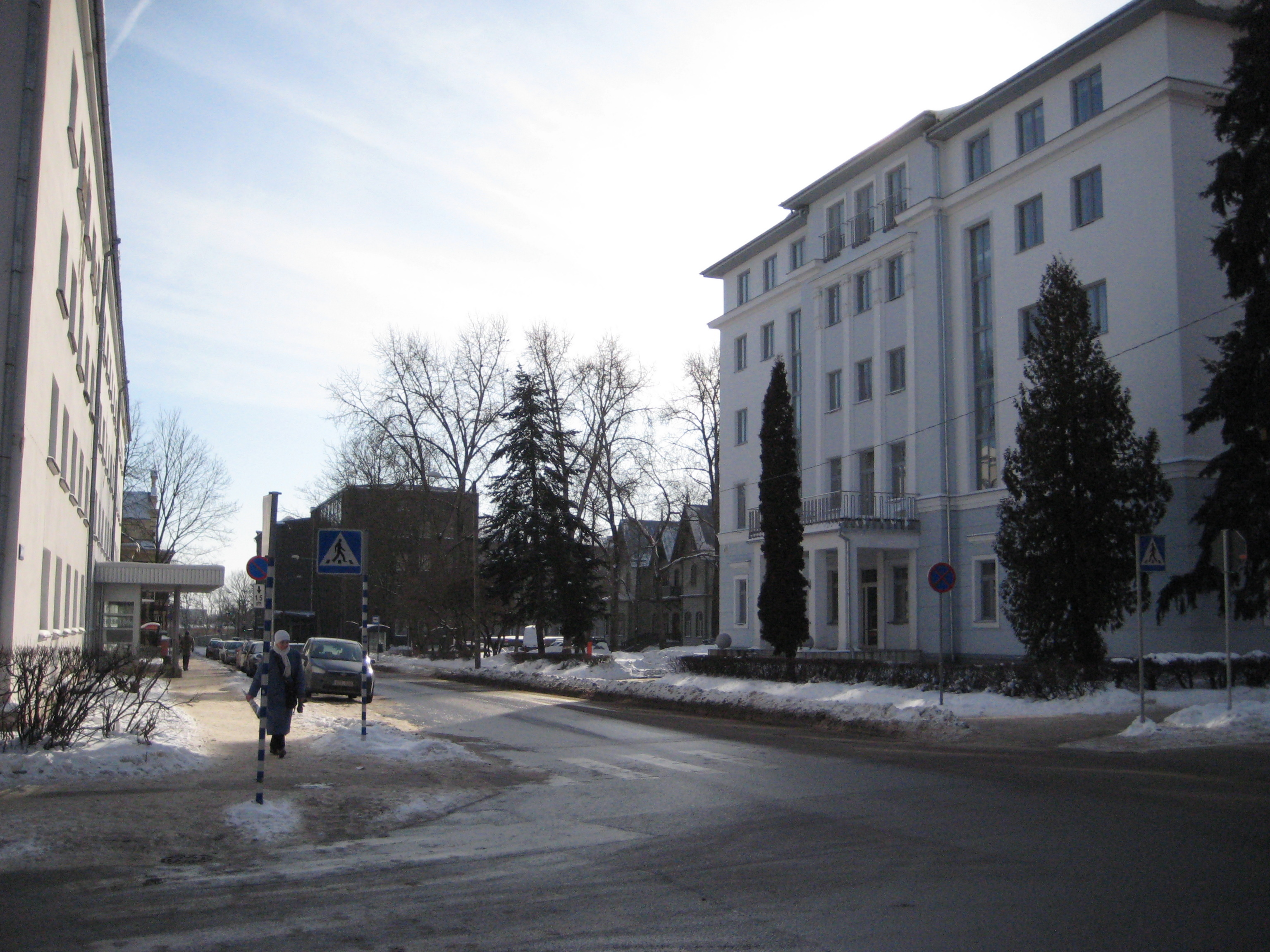 Pepleri tänav Vanemuise ristmikult Riia tänava poole, Tartu